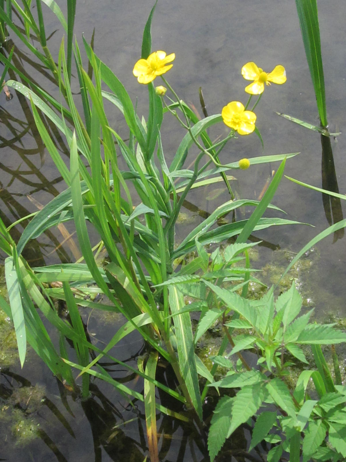 Ranunculus lingua. Aan de oever van de Zandwetering te Deventer in een nieuw aangelegd retentiegebied.